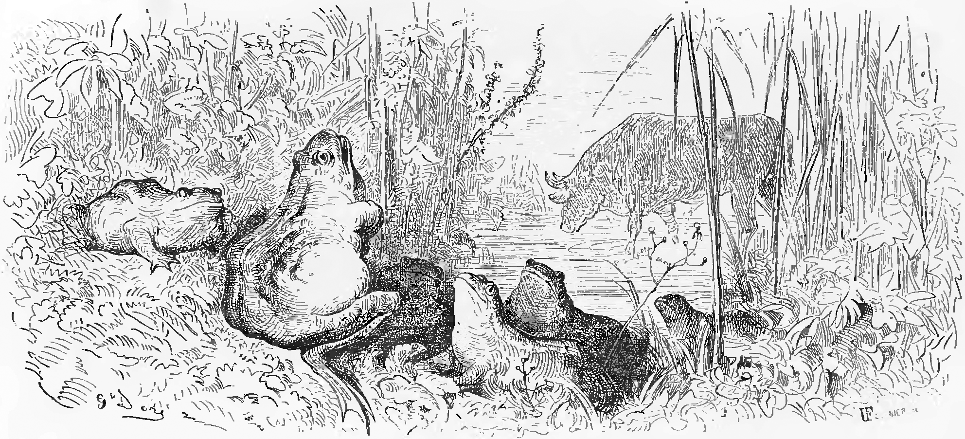 grafika z książki PL Bajki, Jean de La Fontaine, nakładem i drukiem Jana Noskowskiego, Warszawa 1876